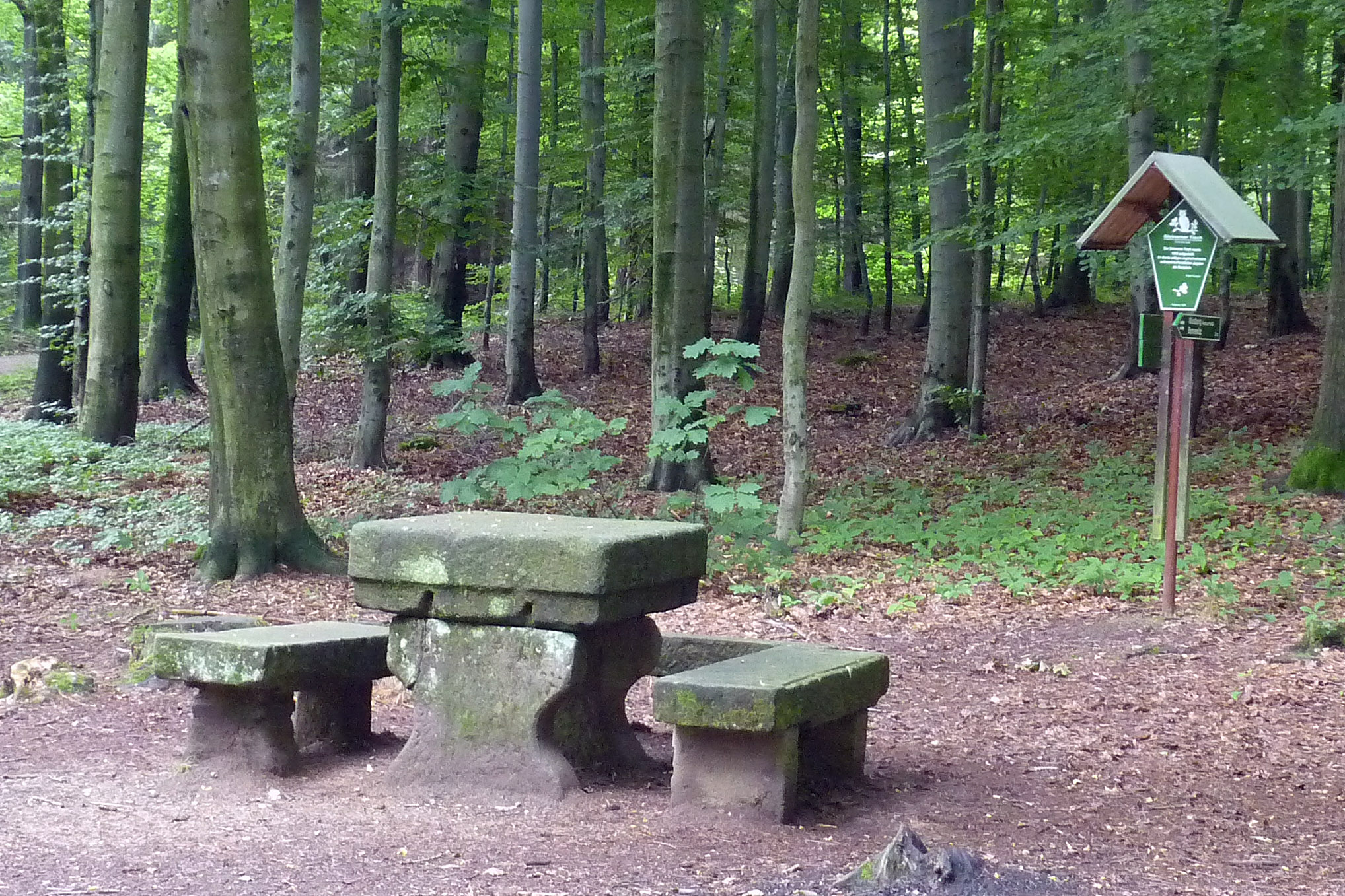 Steinerner Tisch im Poisenwald bei Freital